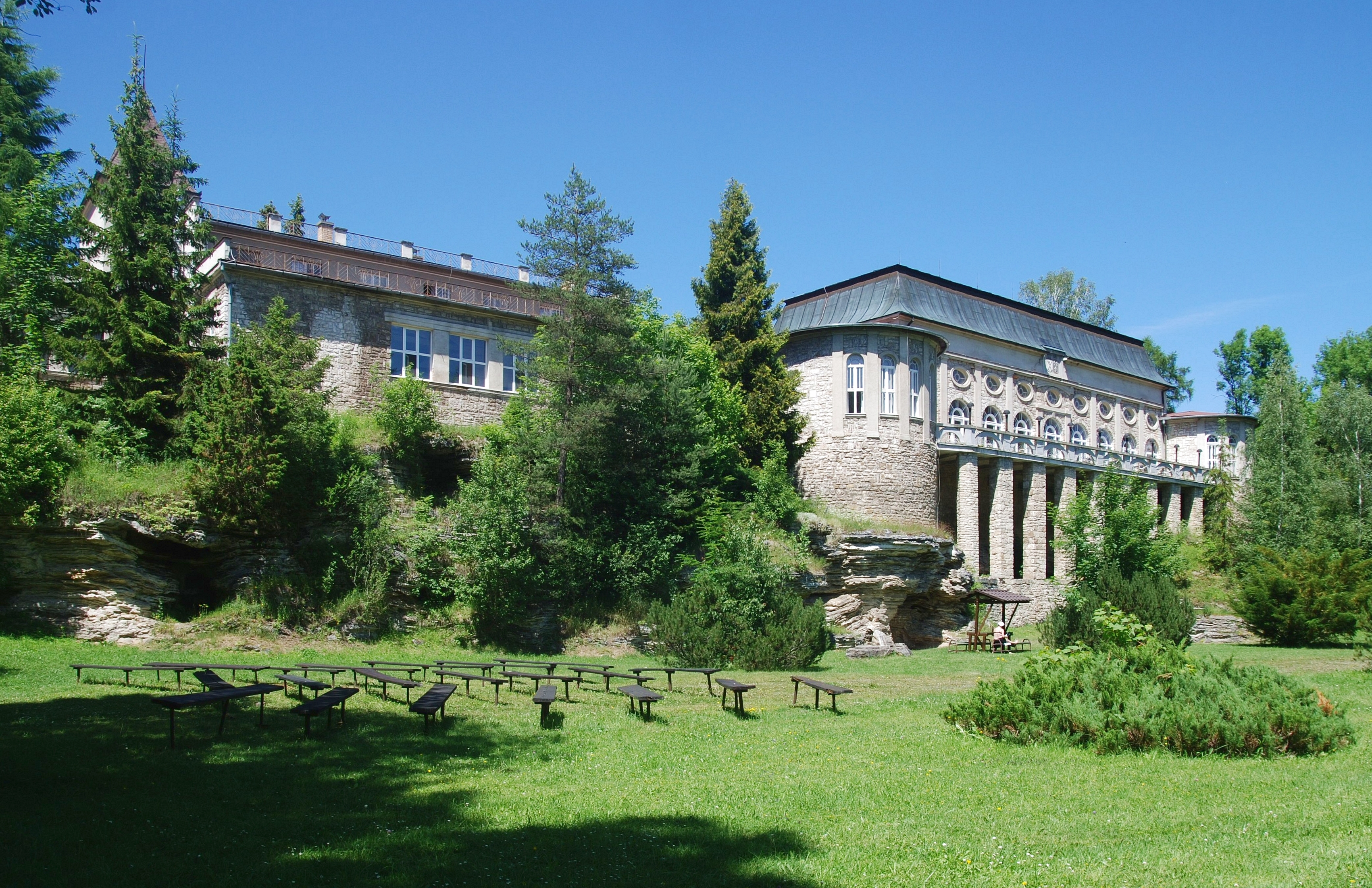 wieś Vyšné Ružbachy